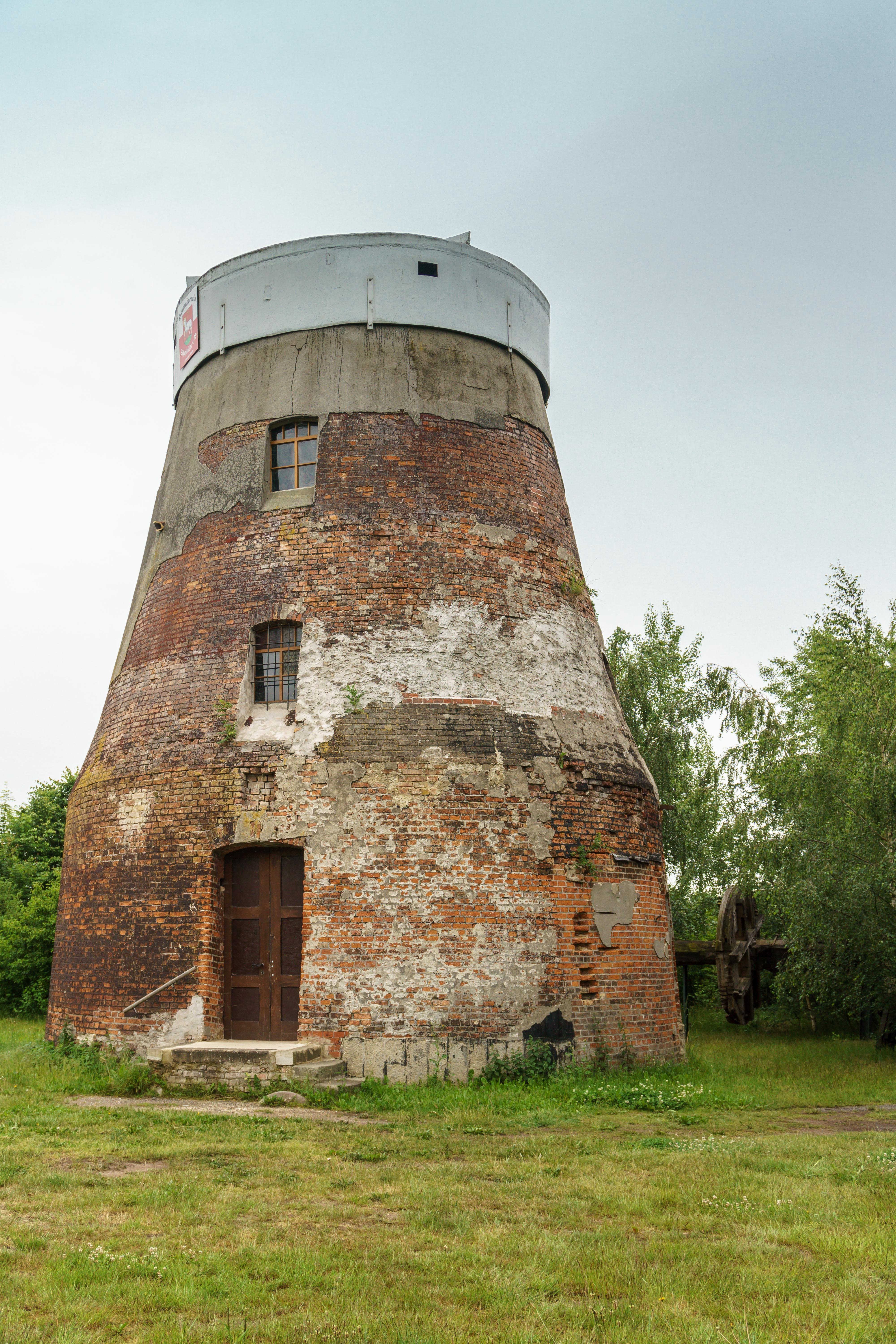 Turmholländermühle an der südlichen Ortgrenze am Oberwünscher Weg vom Schafstädt